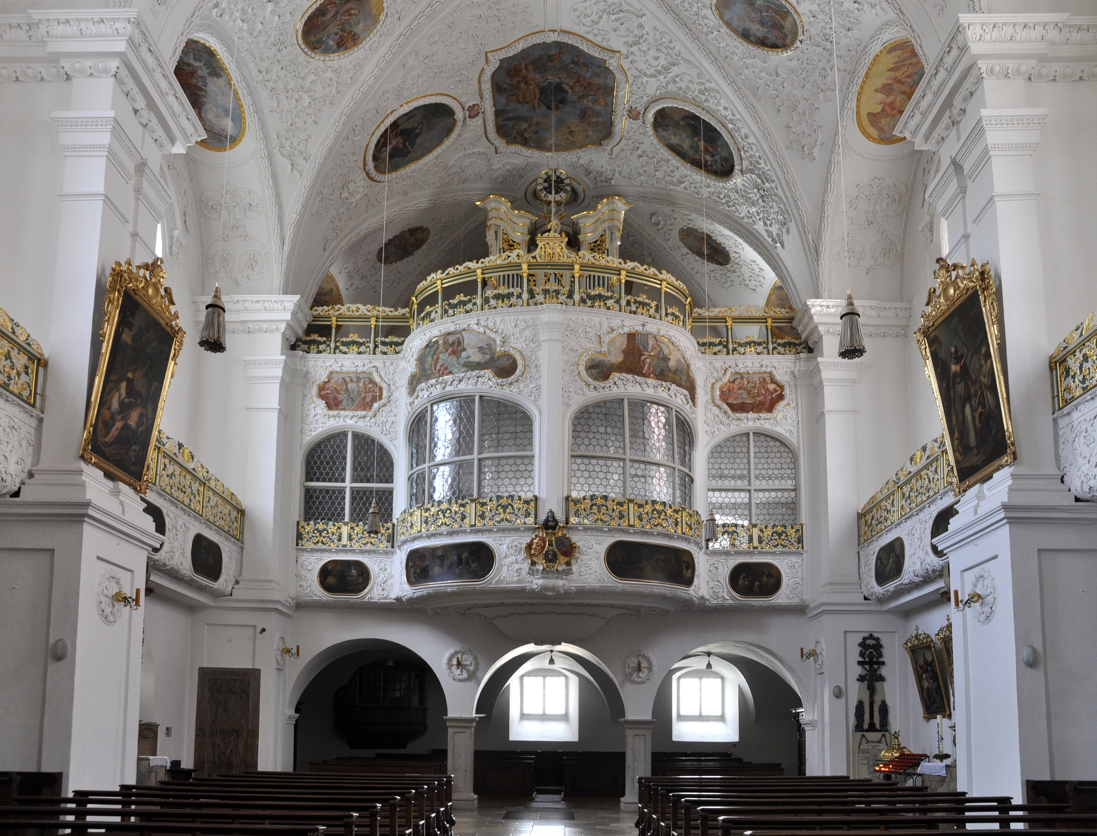 Kircheninneres nach SüdwestenThis is a photograph of an architectural monument.